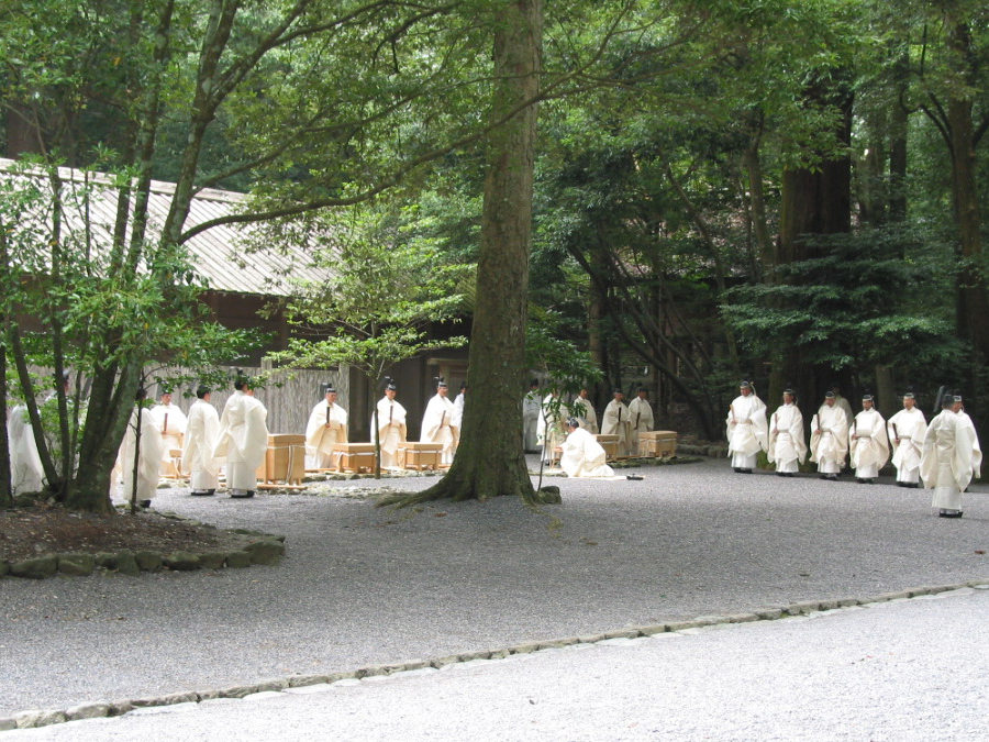 Shuhatsu of Kazahinomi-sai (in front of Imibiyaden, Naiku) 風日祈祭・修祓（皇大神宮・忌火屋殿前）三重県伊勢市宇治館町の伊勢神宮内宮（皇大神宮）忌火屋殿前で撮影